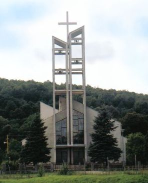 Kategória:Obrázky budov Kategória:Presunúť na Commons